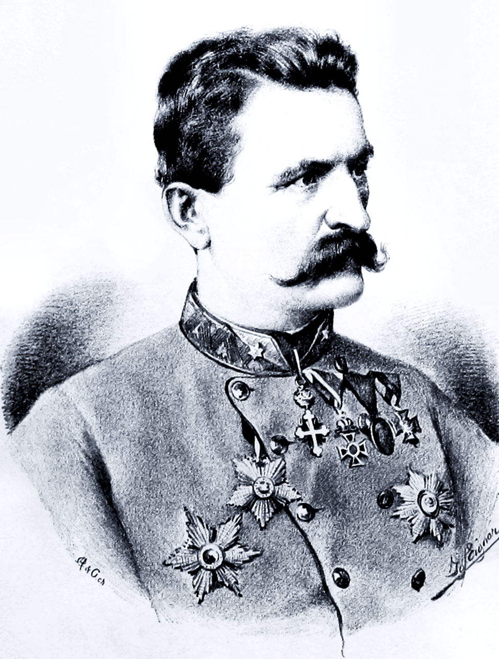 K.u.k. Feldmarschall-Leutnant Alexander Guran, hier im Range eines Generalmajors.